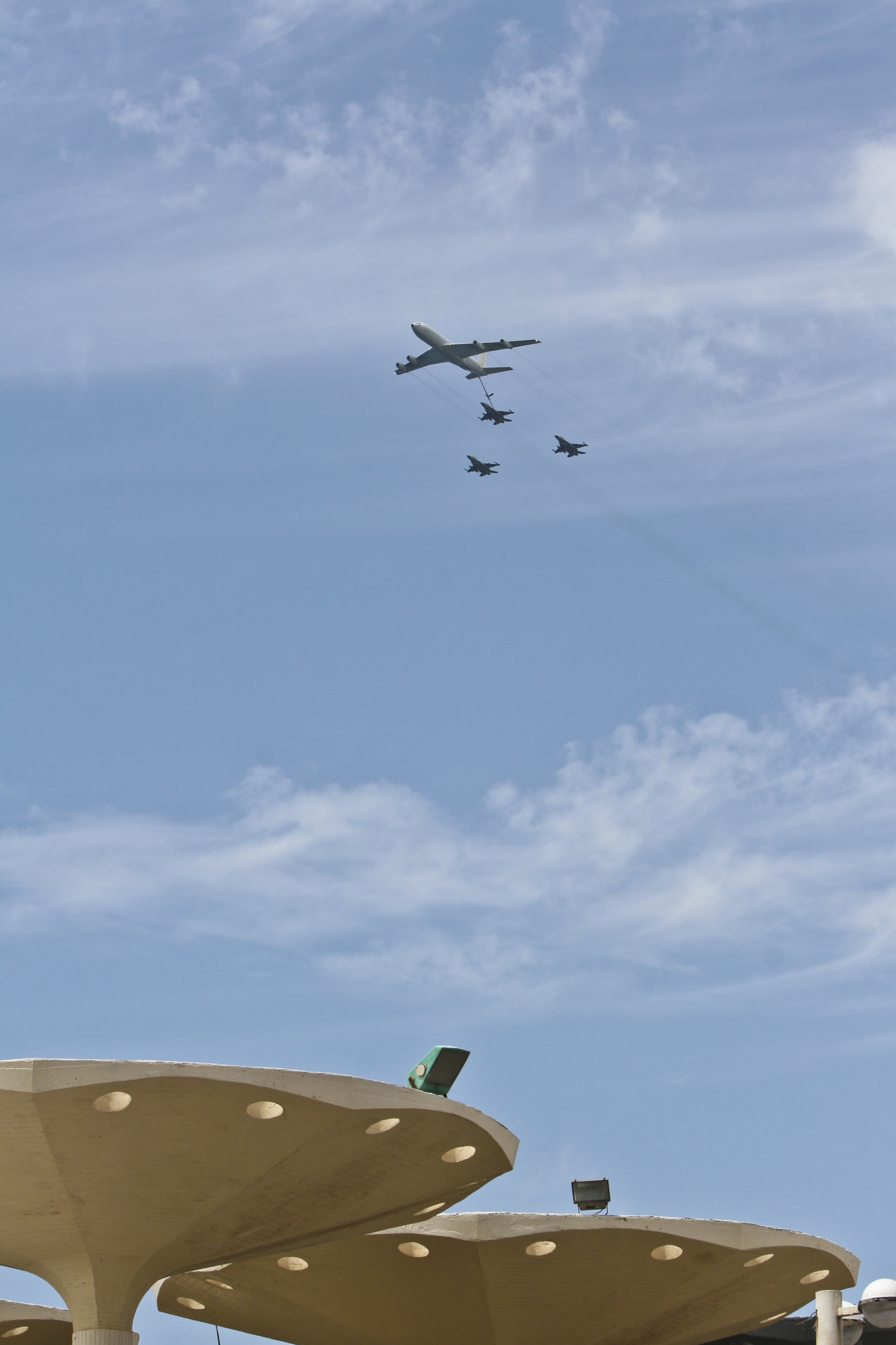 מפגן חיל האוויר יום העצמאות ה-60 למדינת ישראל